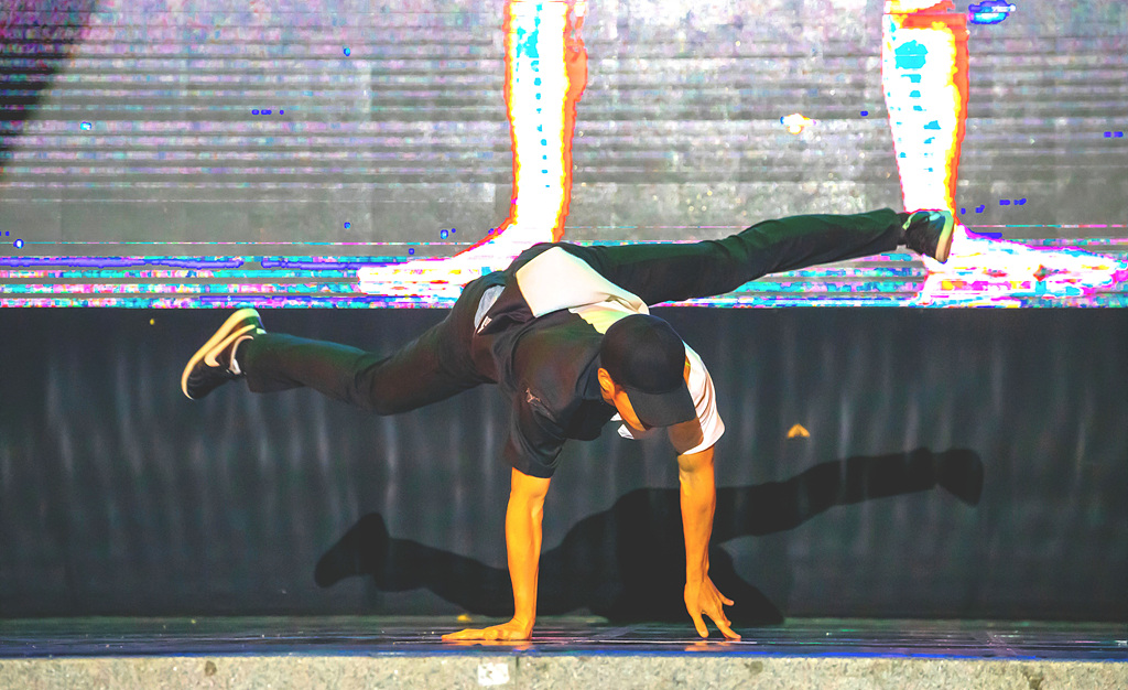 비보이 그룹 퓨전MC의 공연 모습